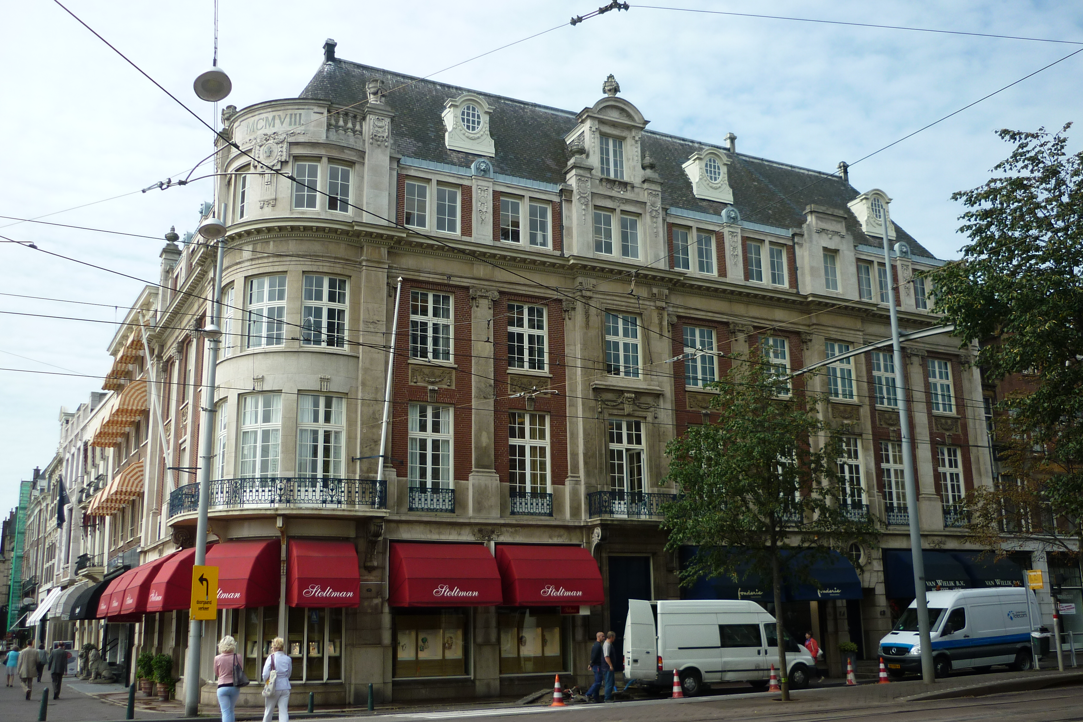 Haags pand op hoek Kneuterdijk / de Plaats